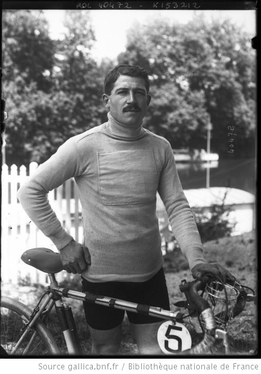 Jean Rossius portrait du coureur cycliste avant le départ